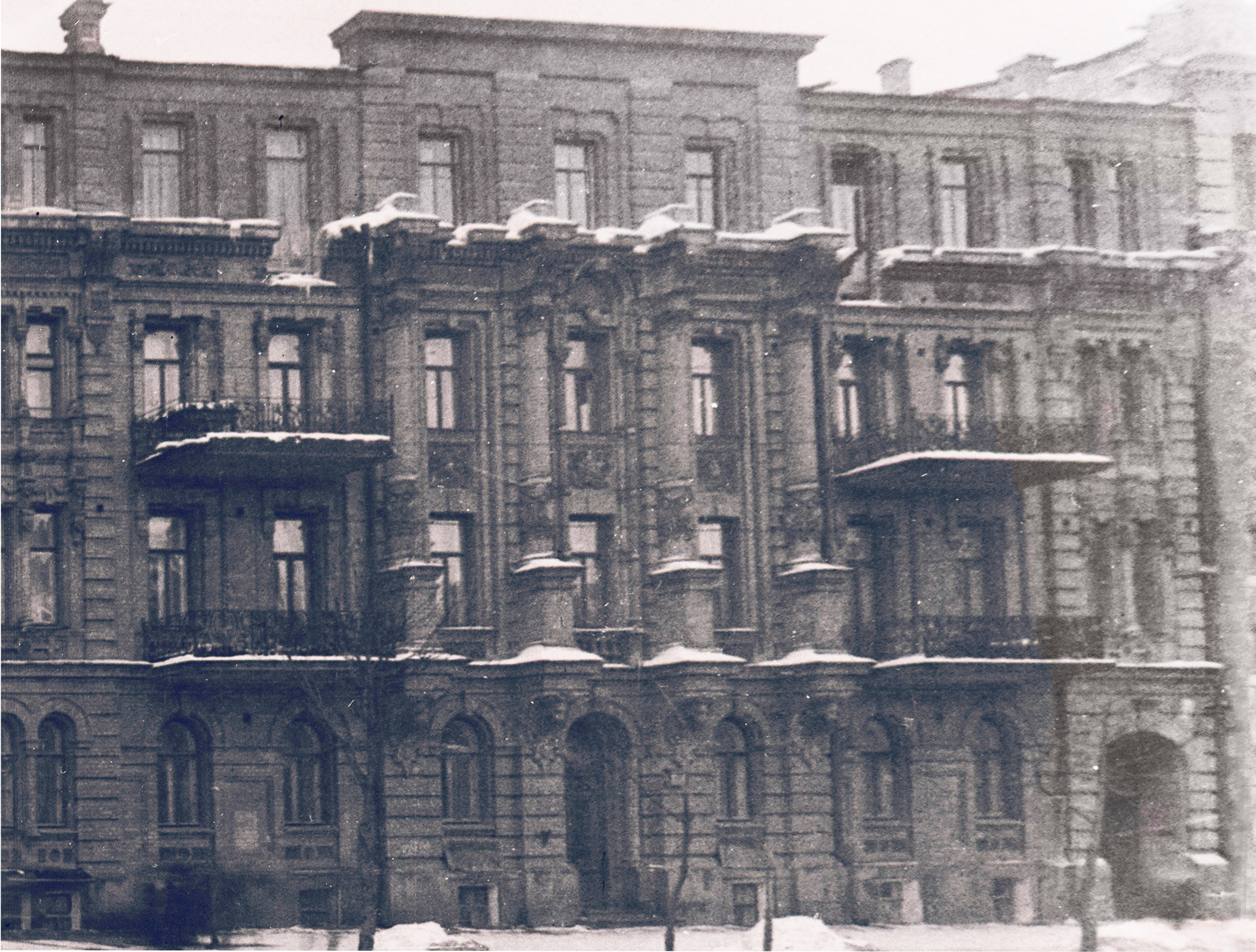 Будинок із левами, Київ, вул. Пушкінська, 33-а